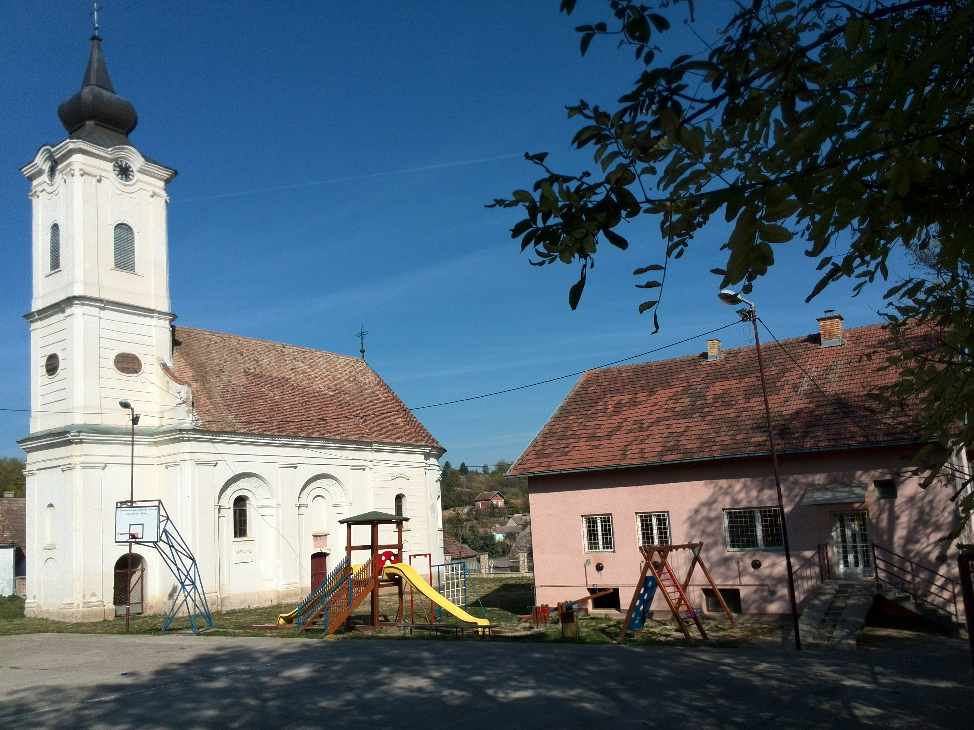 Srpski (latinica): Crkva i Osnovna škola u Viziću, Srem, Srbija